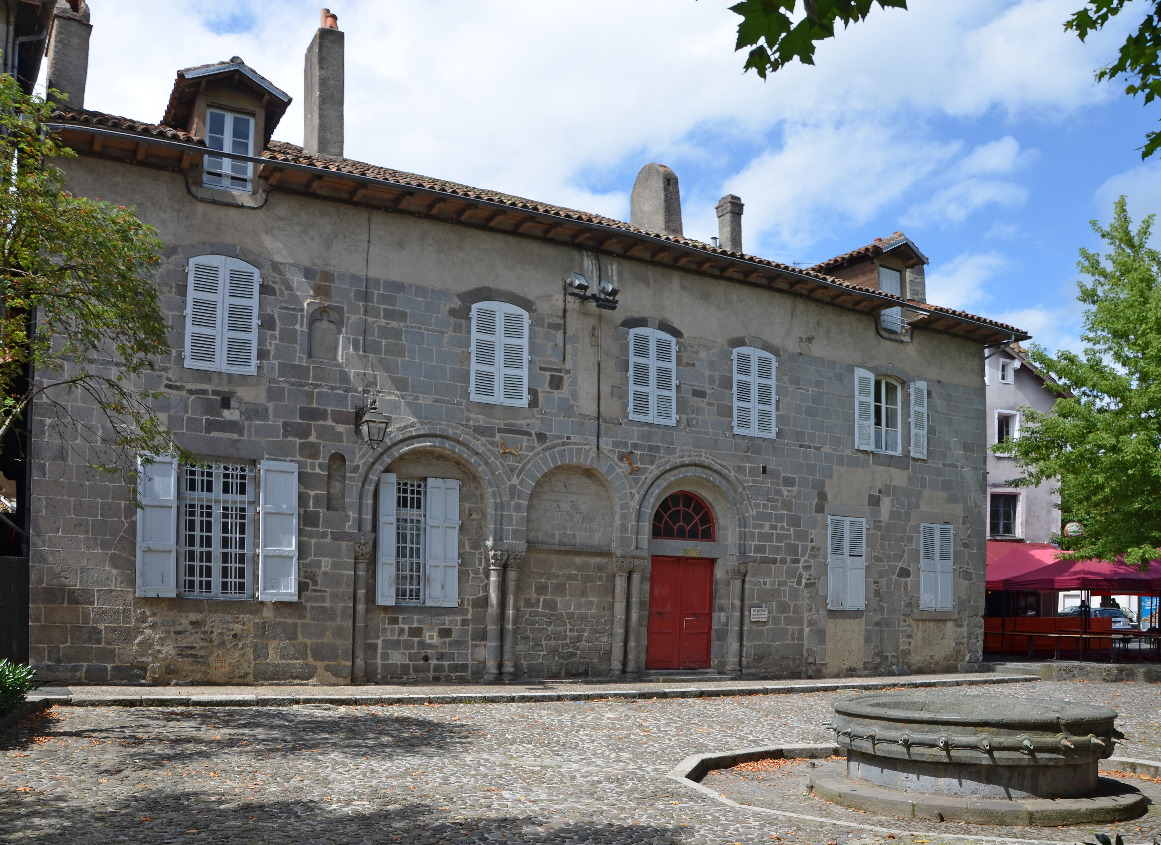 Maison 5 place St Géraud à Aurillac, Cantal, France .